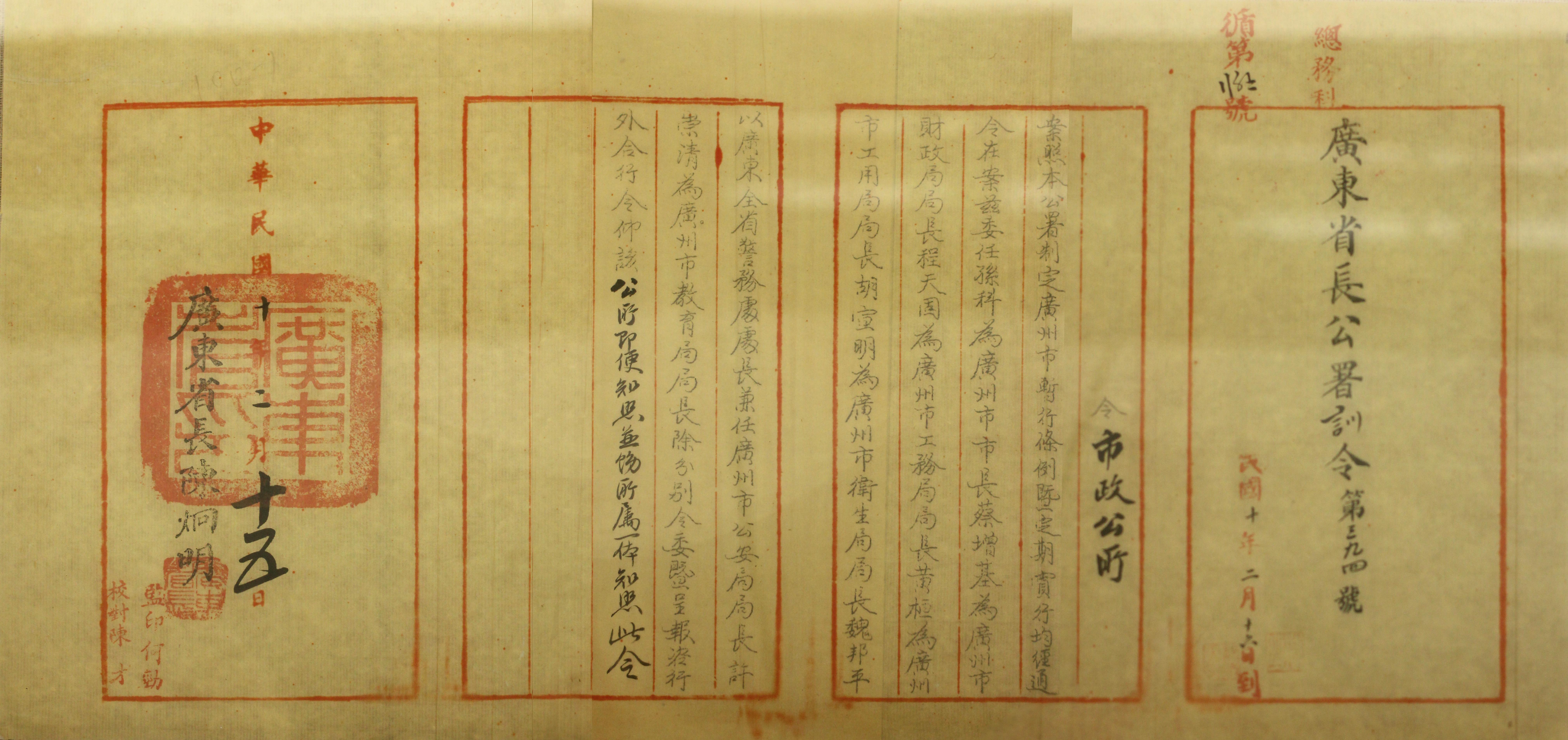 廣東省長公署委任孫科為廣州市長及委任各局長的委任令。